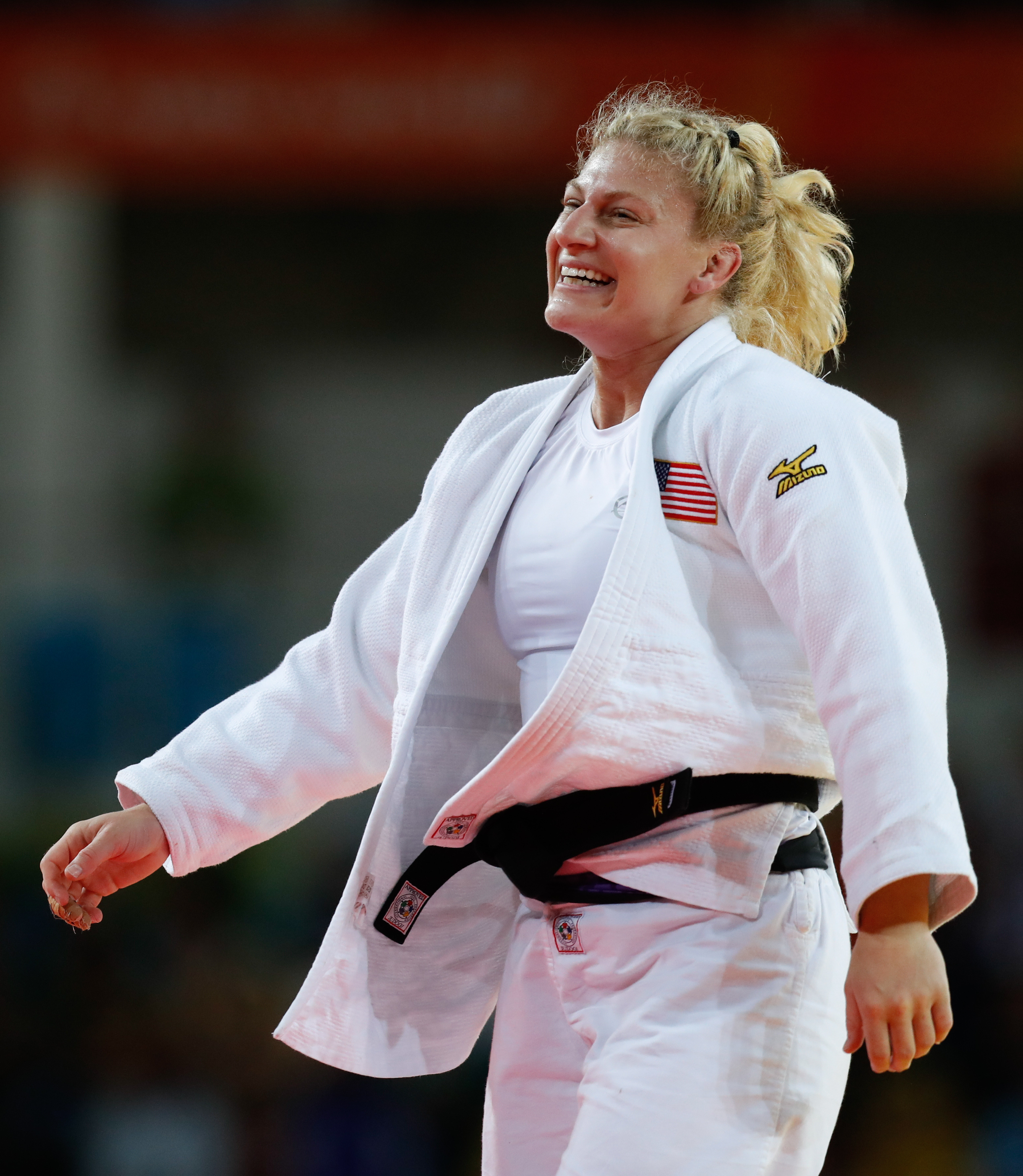 Rio de Janeiro - A judoca norte-americana Kayla Harrison vence a francesa Audrey Tcheumeo na categoria até 78 quilos e ganha medalha de ouro na Rio 2016 (Fernando Frazão/Agência Brasil)